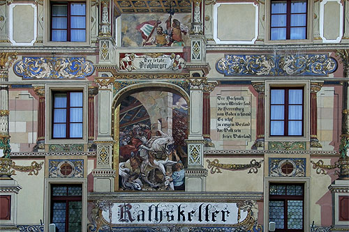 Bemalte Fassade des Rathskellers in Olten (rückseitig; grabenseitig), von Emil Kniep (1906). Die Wandmalerei zeigt einen Grafen Eberhard von Frohburg auf seinem Ross, wie er auf der Aarebrücke vom Blitz erschlagen wird. Inschrift: "Der Hochmuth seinen Meister fand / die Herrenburg vom Boden schwand / Es schuf zu ewigem Bestand / das Volk sein freies Vaterland".[1] Kniep hat das Gemälde dem Bild von Gesslers Tod in der Tellskapelle (Ernst Stückelberg 1879/80) nachempfunden (ein Tyrann stürzt erschlagen von seinem Pferd), vgl. die Mutter mit Kind, die in beiden Szenen vor dem Pferd steht bzw. kniet. Die Frohburger waren bis bis zu ihrem Erlöschen im späteren 14. Jh. die Herren von Olten. Ein "letzter Frohburger" Eberhard, der von Blitz erschlagen worden wäre ist legendär; der letzte Graf von Frohburg war Johann, gestorben 1366 (den Grafentitel erbte kurzfristig Hermann VI., Abt des Klosters St. Urban, der jedoch im Folgejahr ebenfalls verstarb).[2]